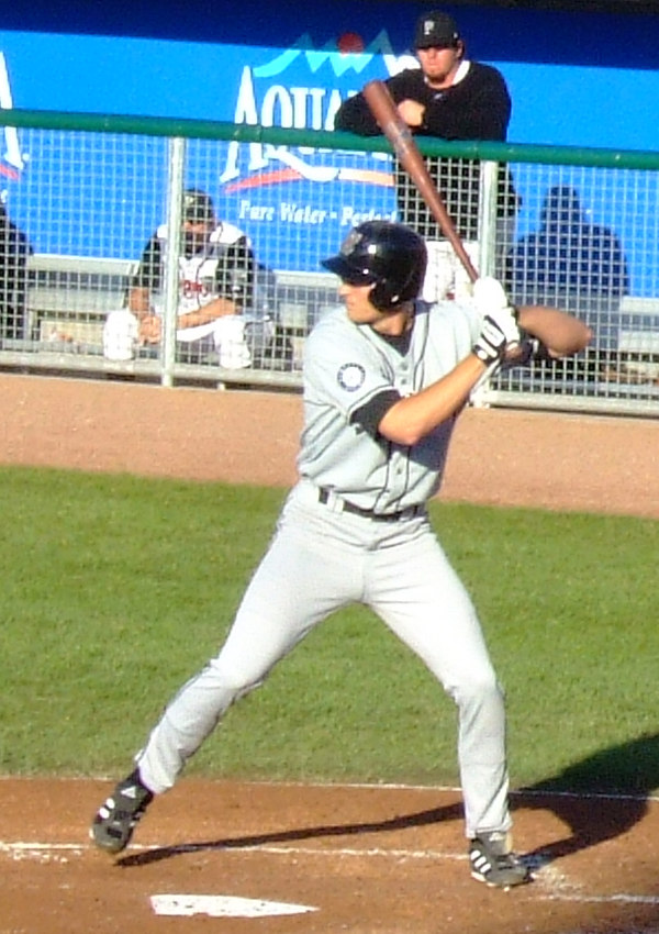 Michael Saunders